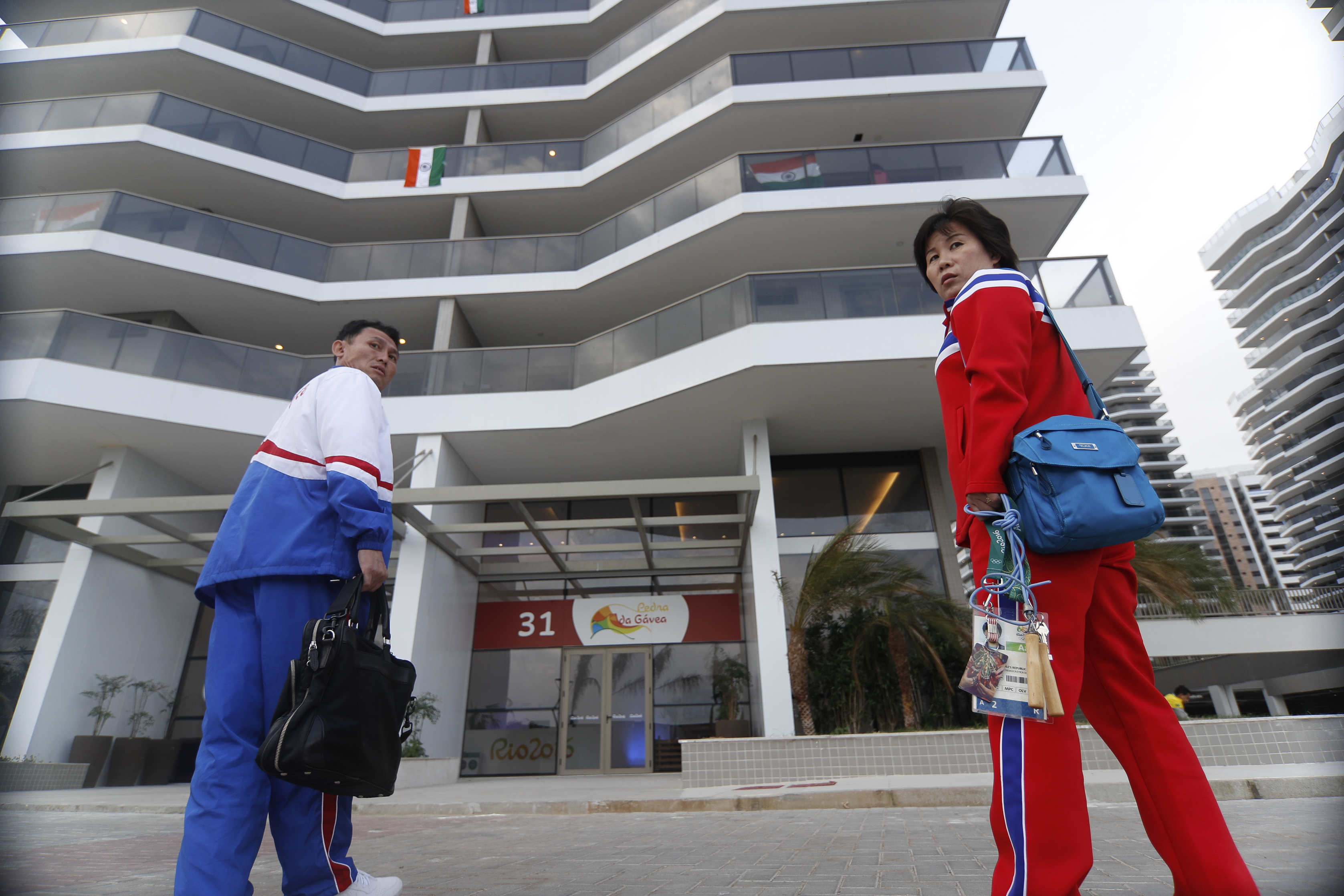 Rio de Janeiro - Representantes da Coréia do Norte na área residencial da Vila Olímpica dos Jogos Rio 2016, onde estão hospedados os atletas. (Foto: Fernando Frazão/Agência Brasil)